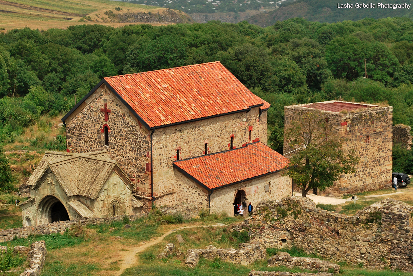 დმანისის ნაქალაქარიდმანისის სიონი, პატარა დმანისის წმინდა მარინეს ეკლესია, სამრეკლო, გალავანი, აბანო და სხვა ნაგებობანი.